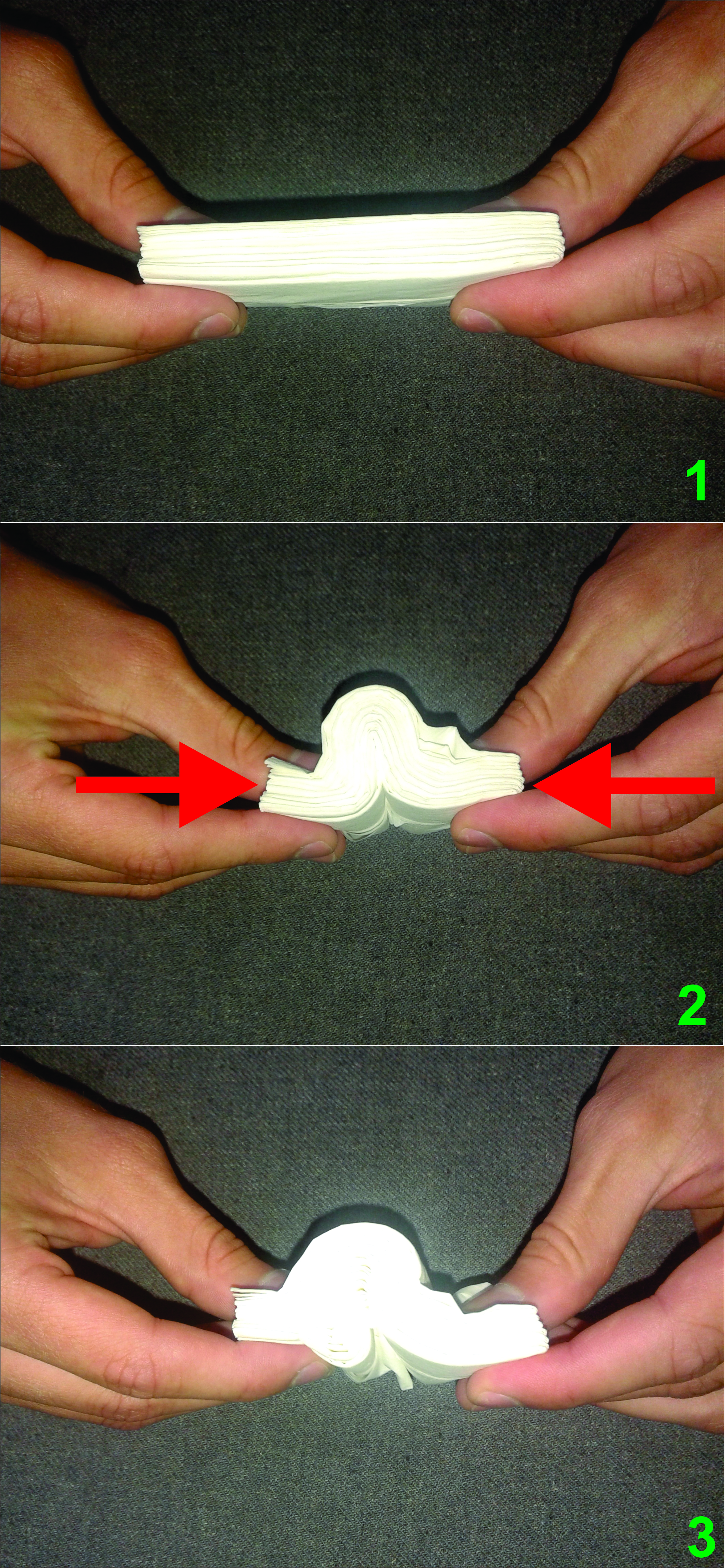 Nabiranje slojeva